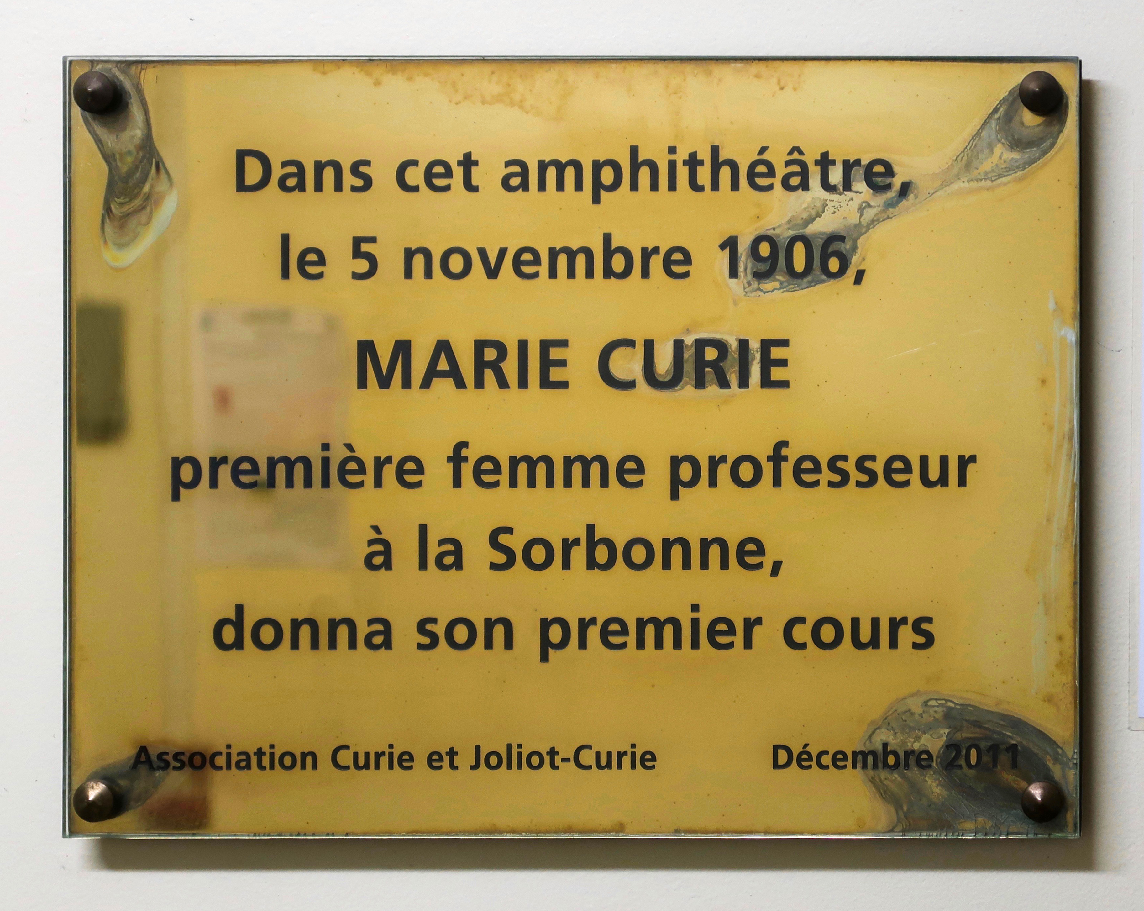 Plaque en hommage à Marie Curie, devant l'amphithéâtre Lefebvre de La Sorbonne (Paris, 5e), où elle donna son premier cours le 5 novembre 1906, devenant la première femme professeur de l'institution.